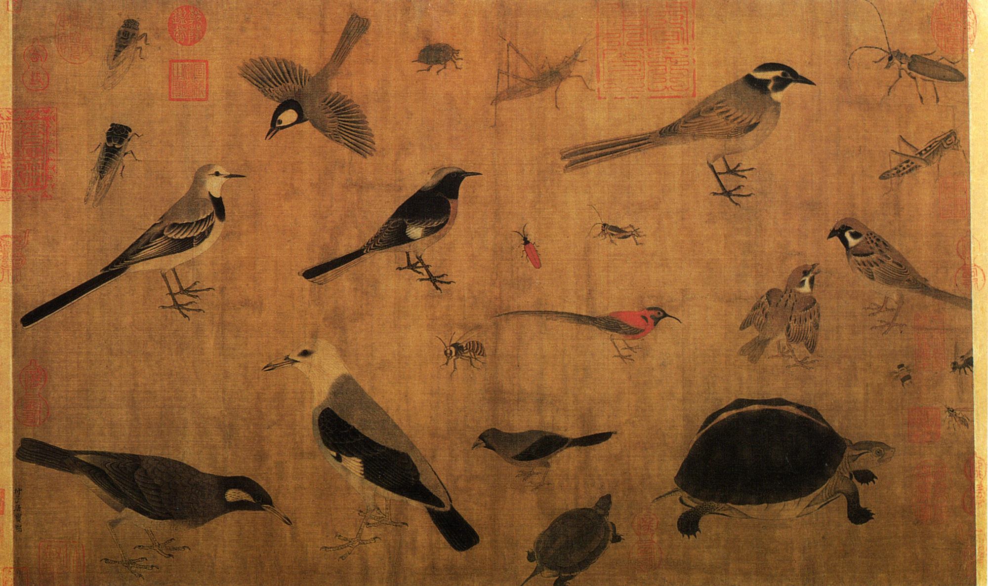 Étude d'oiseaux et d'autres êtres vivants. Par le peintre chinois Huang Quan. Double feuille d'album montée sur un rouleau portatif. Encre et couleurs sur soie. 41 x 70 cm. Daté vers 960. 41,5x70cm. Musée du Palais, Beijing. Connue comme "étude", cette réalisation est considérée aujourd'hui comme une peinture aboutie : Sabine Hesemann in "Les arts de l'Asie Orientale", sous la dir. de Gabriele Fahr-Becker. Könemann 1999.